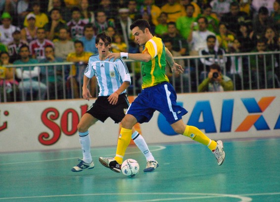 1600WD6680.image_media_horizontal.jpg Jogadores do Brasil e Argentina em uma partida de futsal.